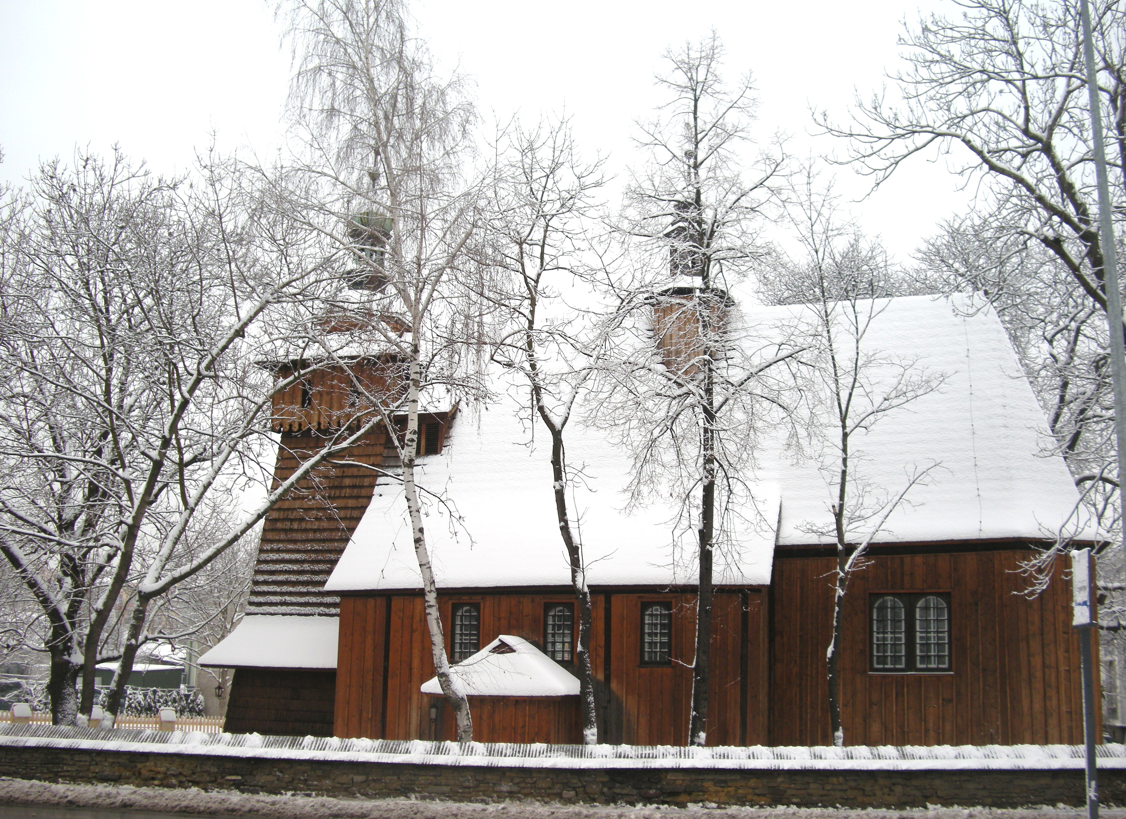 Kościół Matki Bożej Szkaplerznej na Burku w Tarnowie